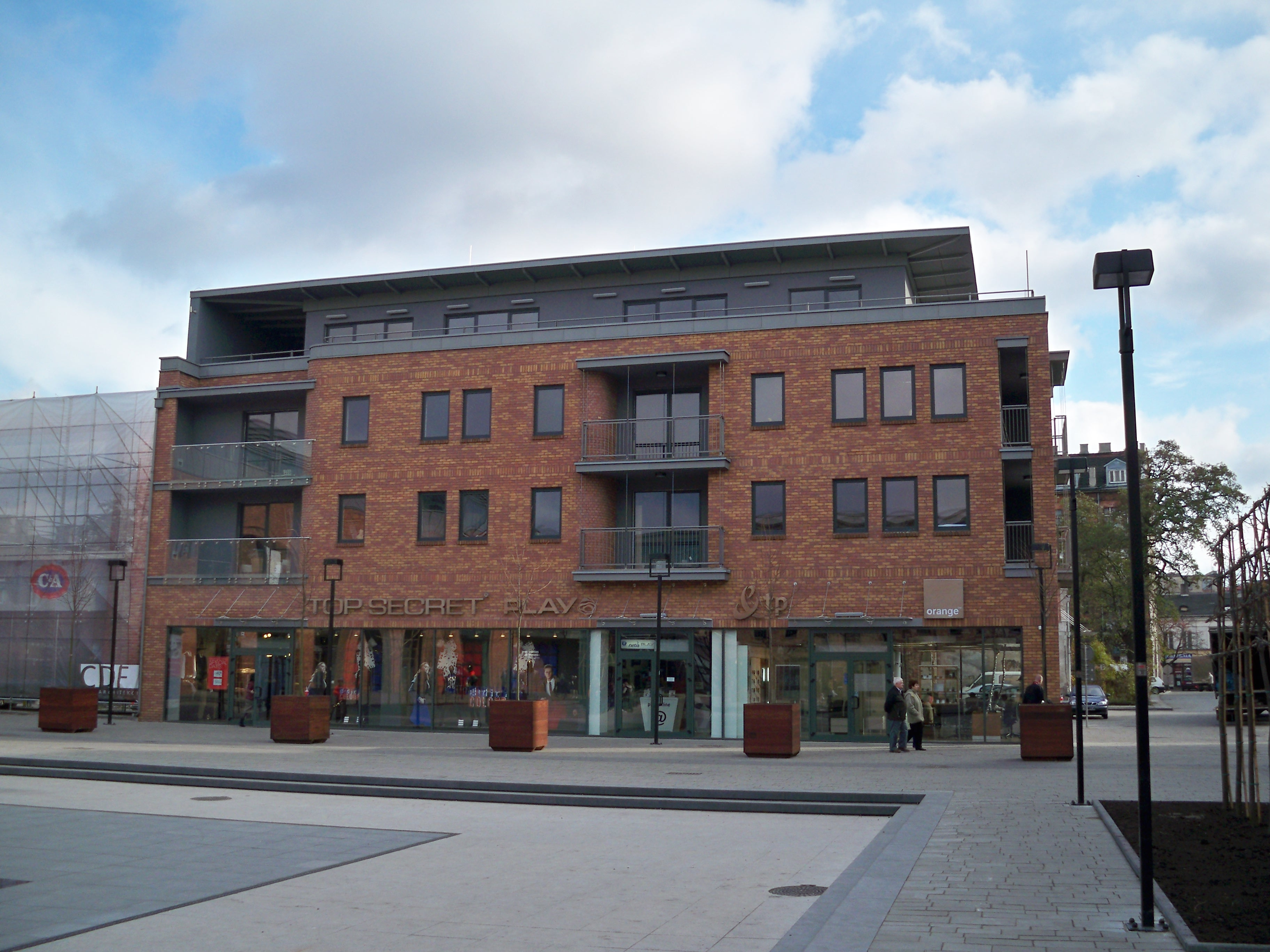 Wzorcownia Włocławek w 2009 r.